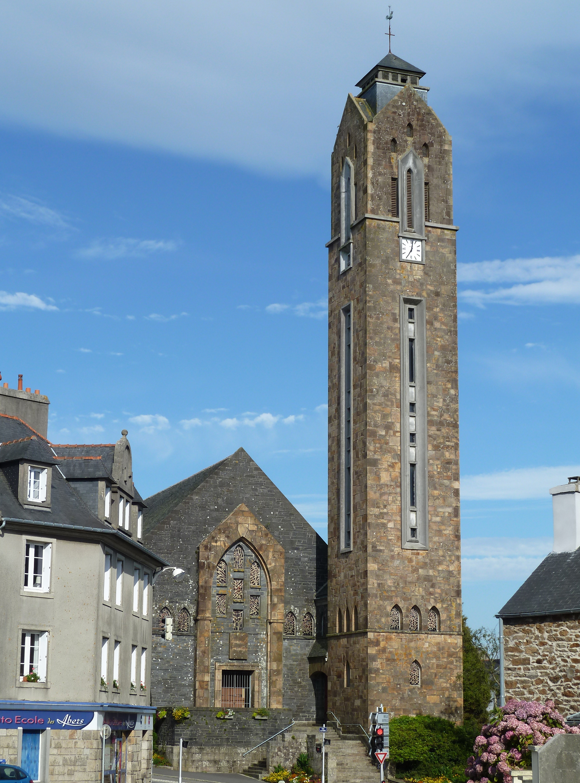 Vue depuis la rue Anne de Bretagne, l'église Saint-Pierre et Saint-Paul de Guipavas